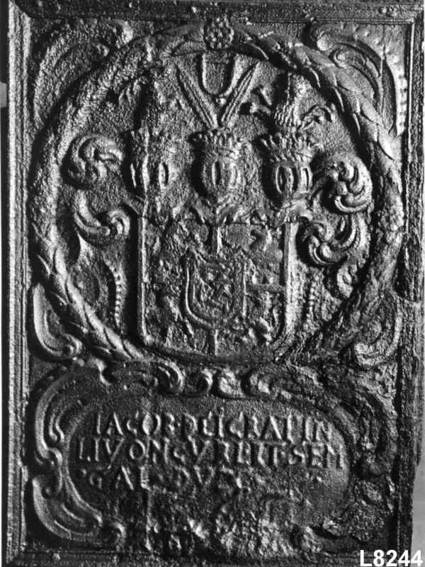 Ovnsplate datert 1665 med innskrift Jaco dei og våpenskjoldet til hertug Jacob av Kurland. Antakelig er modellen skåret av Christopher Ridder og støpt på Eidsvold Værk. Foto Norsk Folkemuseum, NF.1906-0106.